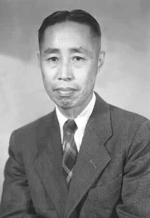 童第周